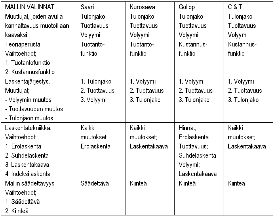 Tuottavuusmallien ominaisuuksien yhtenveto